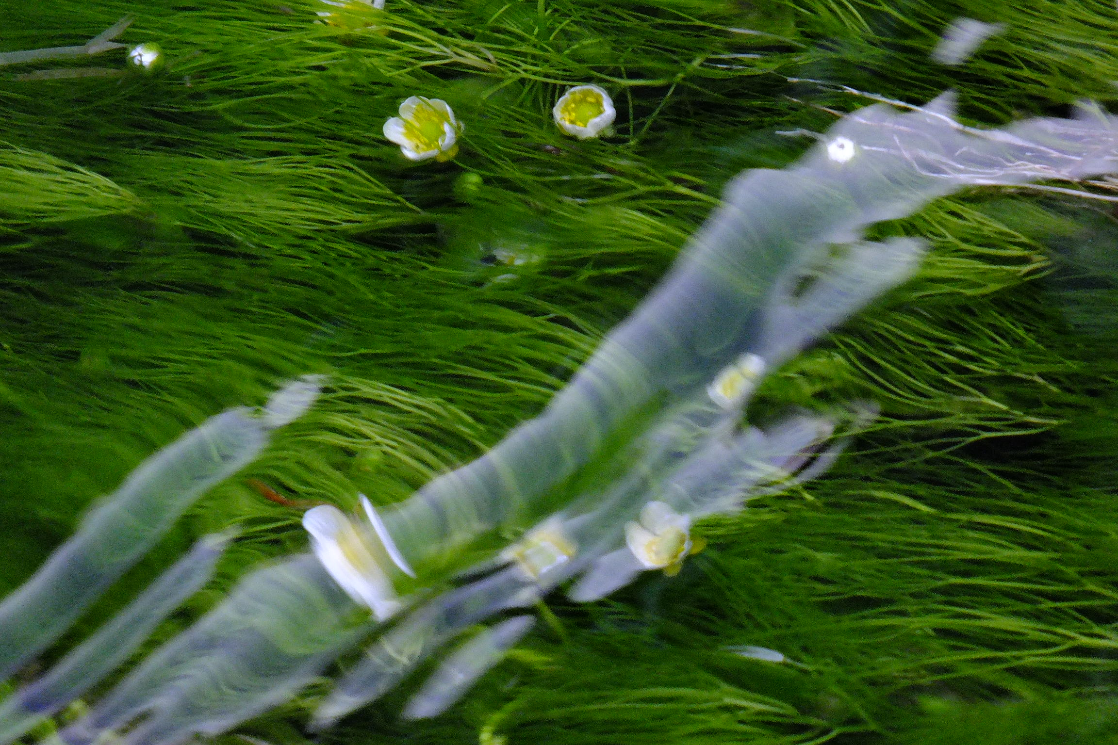 多可町加美区大袋の農業用水路の水中にバイカモ（梅花藻） 2016-05-05 Ranunculus nipponicus バイカモ（梅花藻）多可町加美区大袋